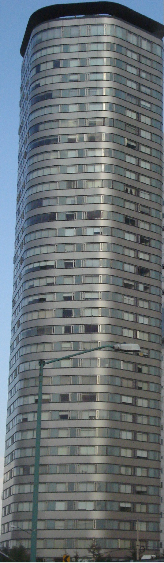 Torre Panorama Santa Fe el tercer edificio más alto de Santa Fe centro financiero ubicado en la Ciudad de México.